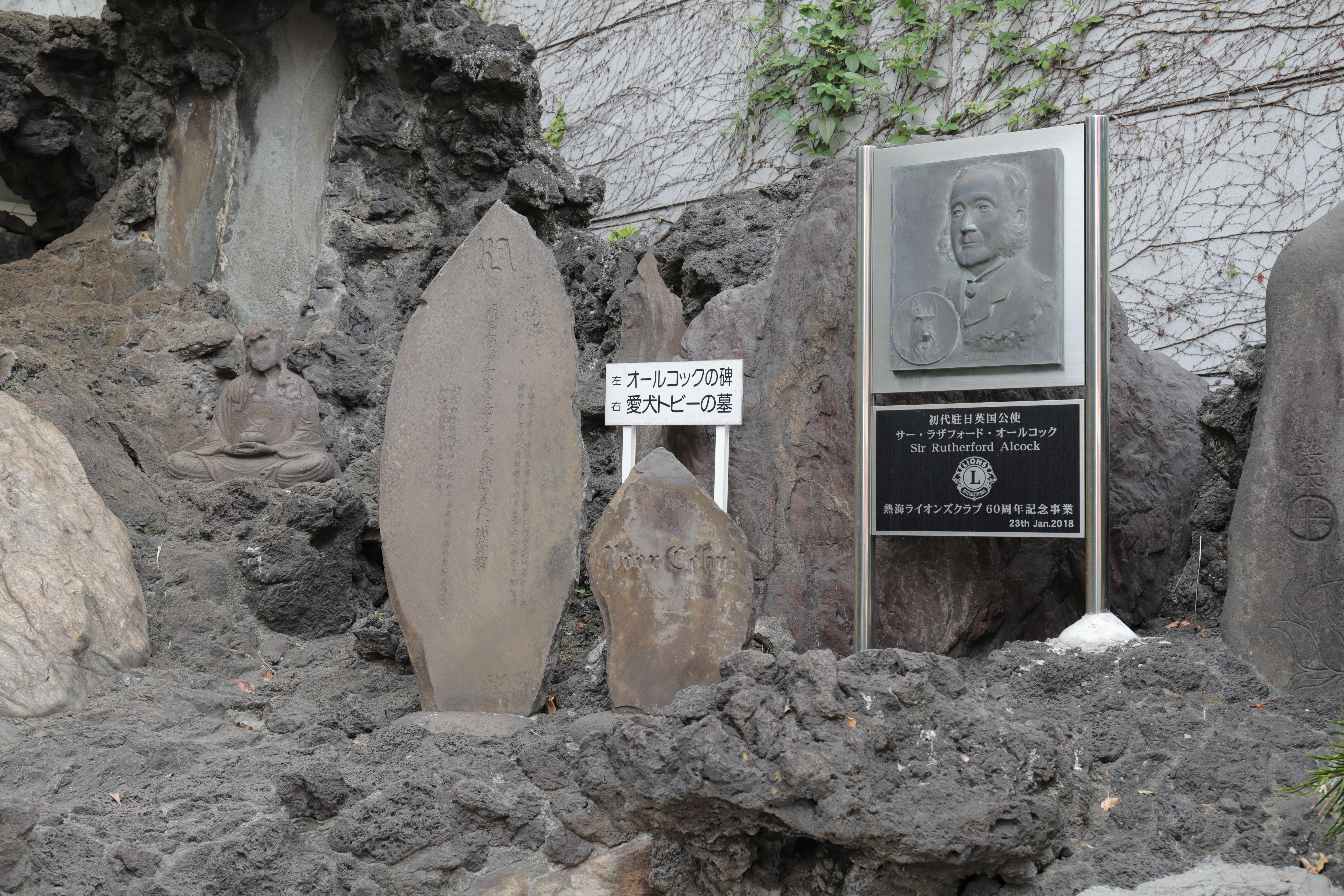 サー・ラザフォード・オールコックが熱海を訪れた記念碑。隣には愛犬トビーの墓碑がある。